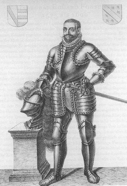 Markgraf Christoph II. von Baden (* 26. Februar 1537; † 2. August 1575 in Ösel) war Markgraf von Baden